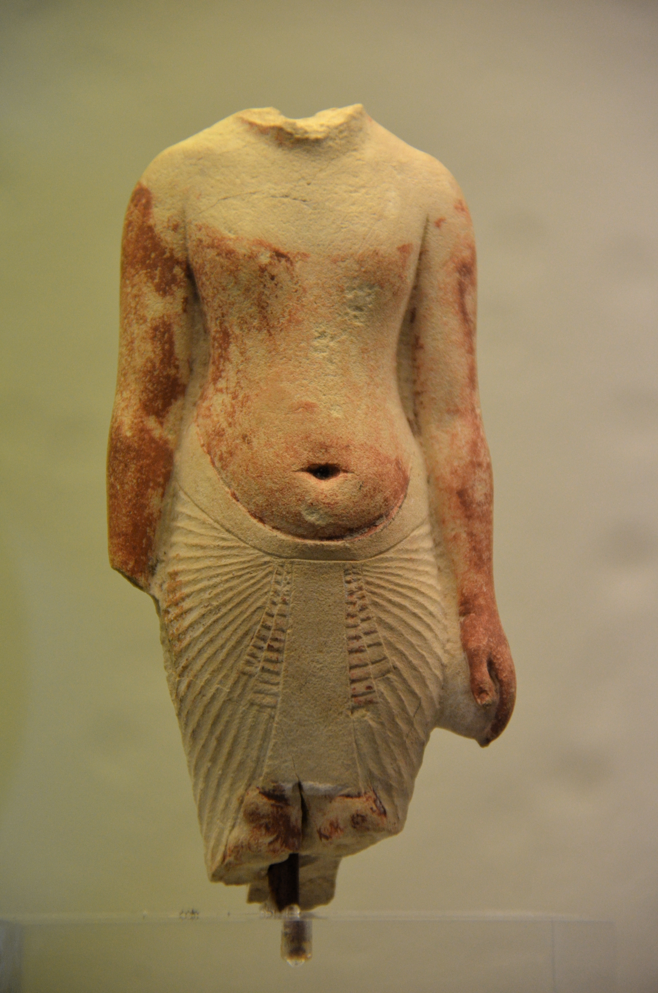 Fouilles de l'Egypt Exploration Society, Amarna. Inv. E.6730 This is a file created at the museum: Jubilee Park Museum in Brussels